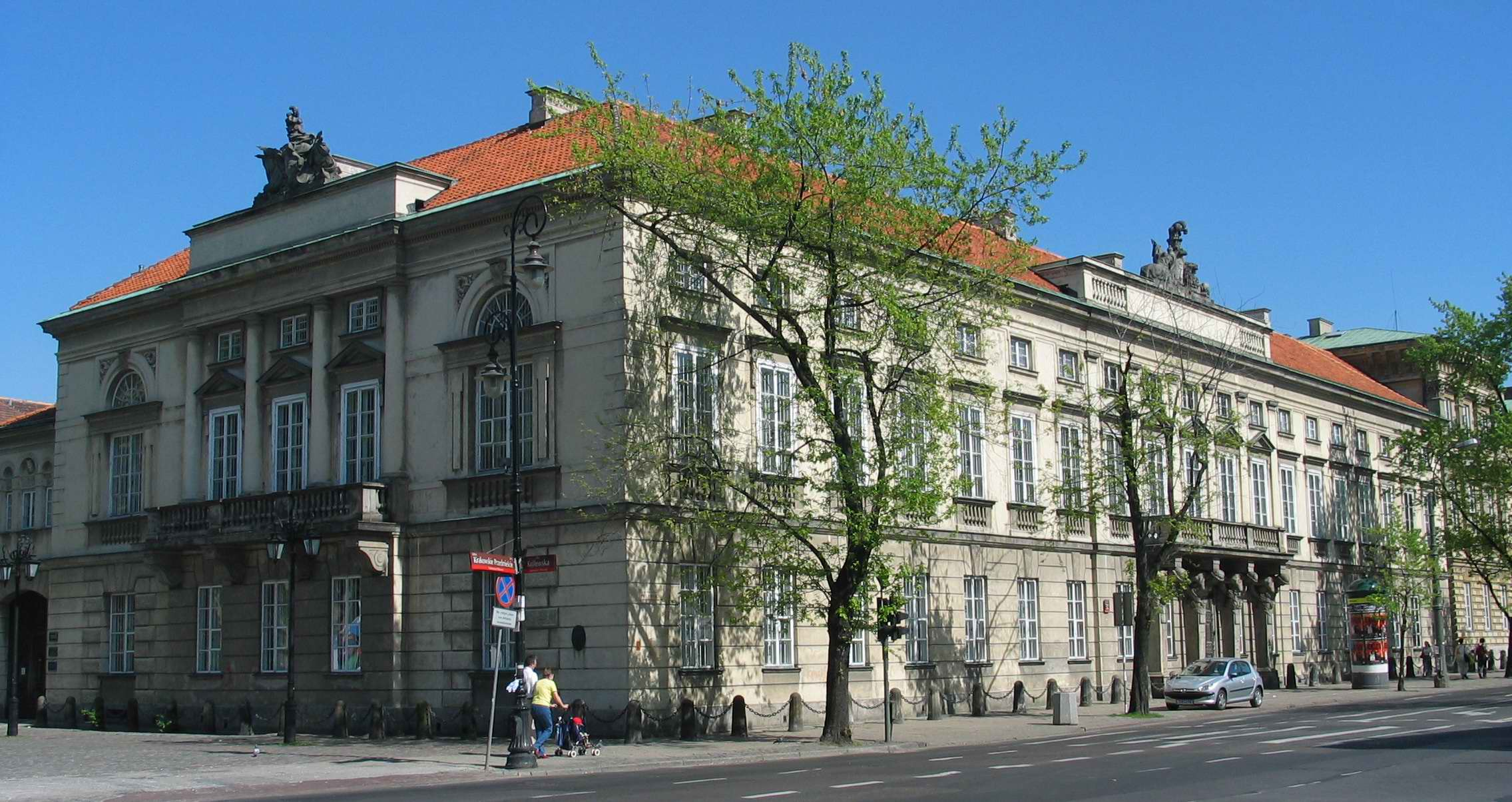 Pałac Tyszkiewiczów w Warszawie. Widok od strony Krakowskiego Przedmieścia (oświetlona strona) i kościoła Wizytek (zacieniona!!!).